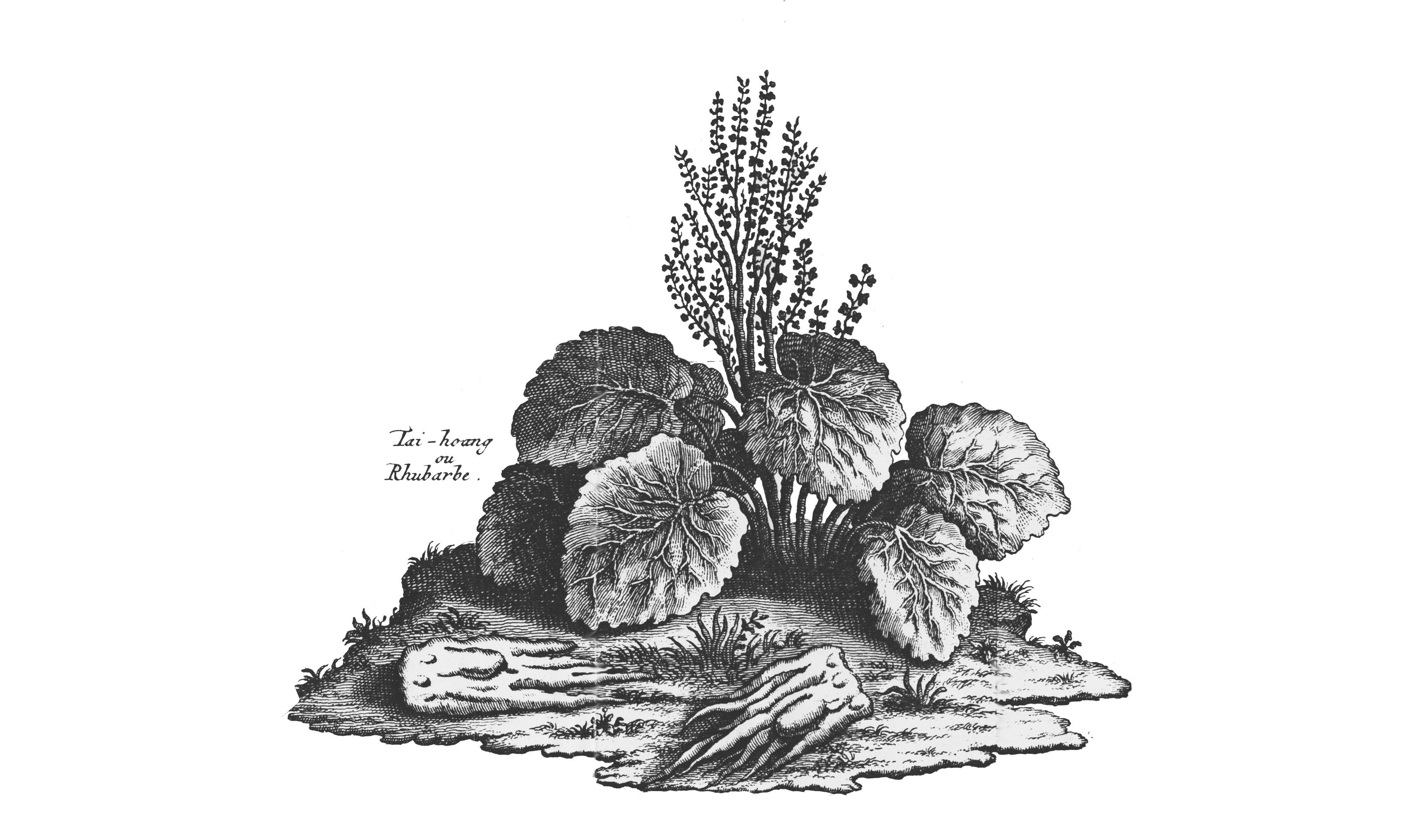 Abbildung des Medizinal-Rhabarvers